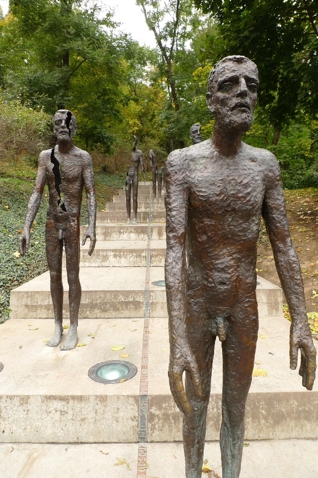 Prag - Olbram Zoubek: Denkmal für die Opfer des Kommunismus (2002)